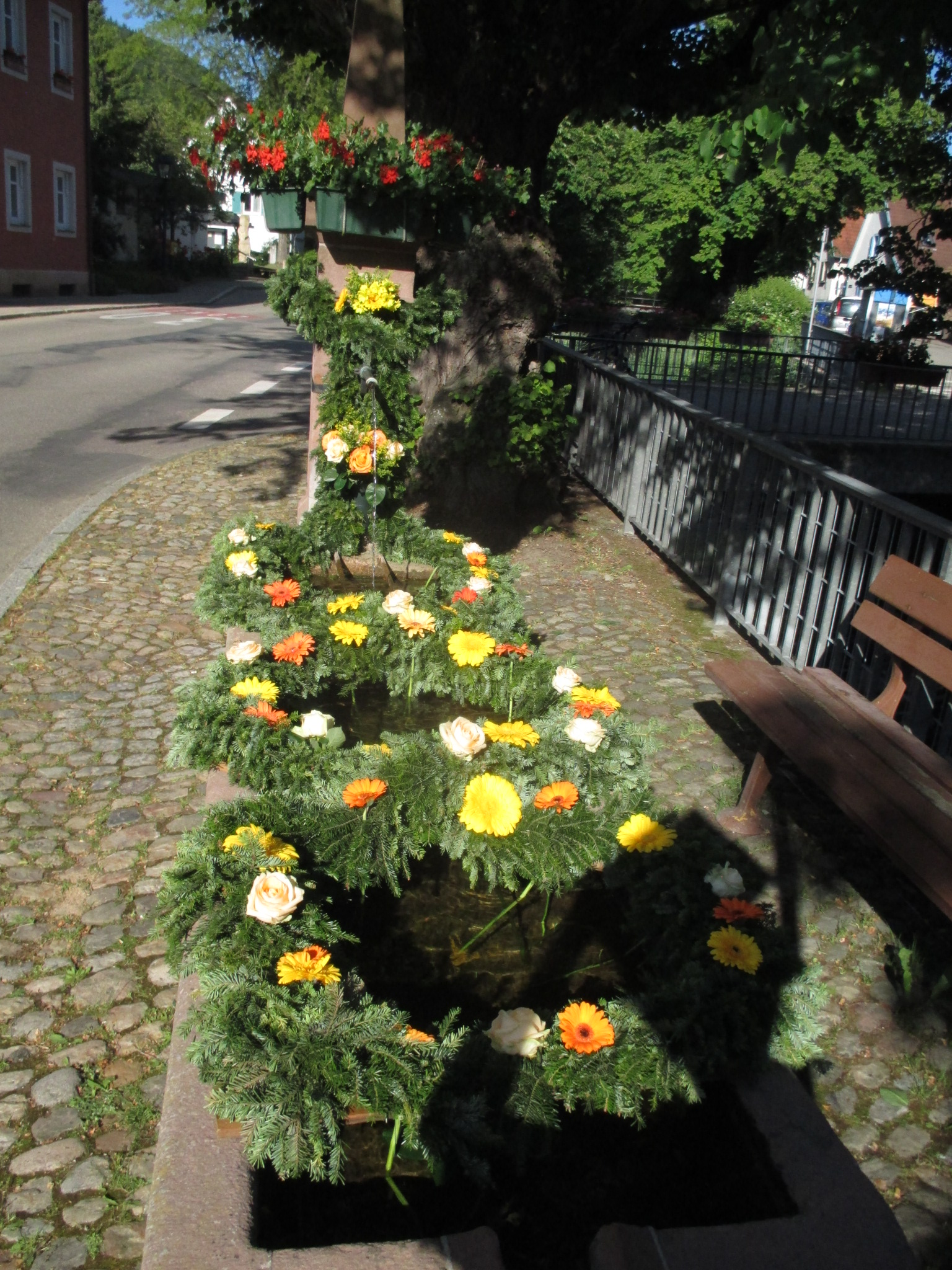 Altes Brauchtum: Quellen- bzw. Brunnenschmuck zu Pfingsten, zu Ehren des Wassers